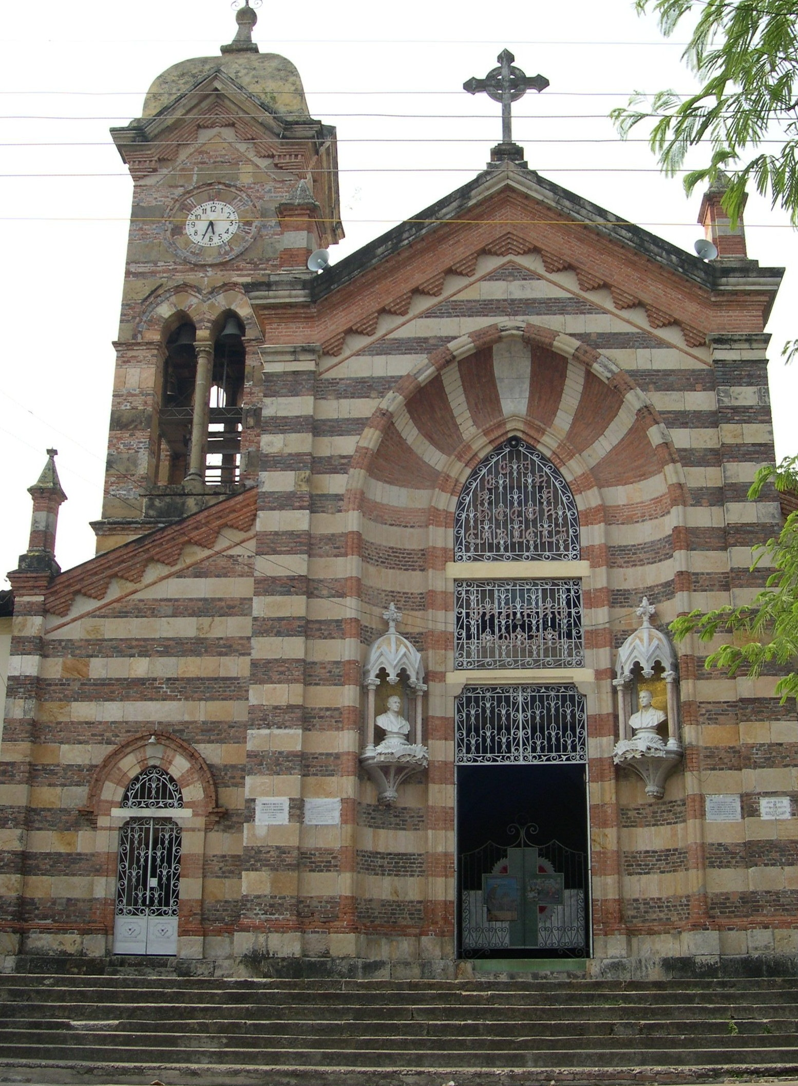 Iglesia de Agua de Dios, Cundinamarca, Colombia